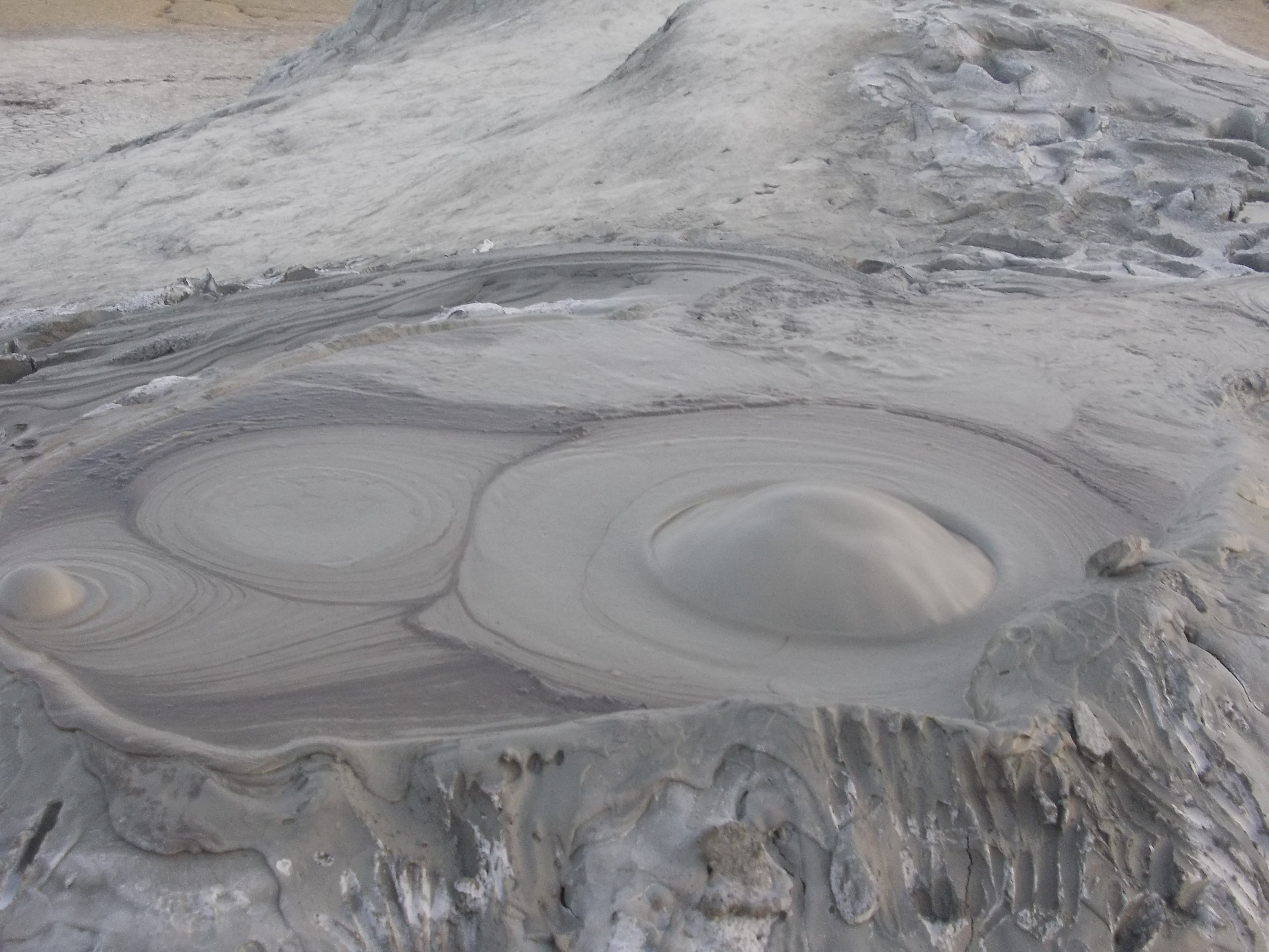 vulvan noroios din Rezervaţia Pâclele Mari